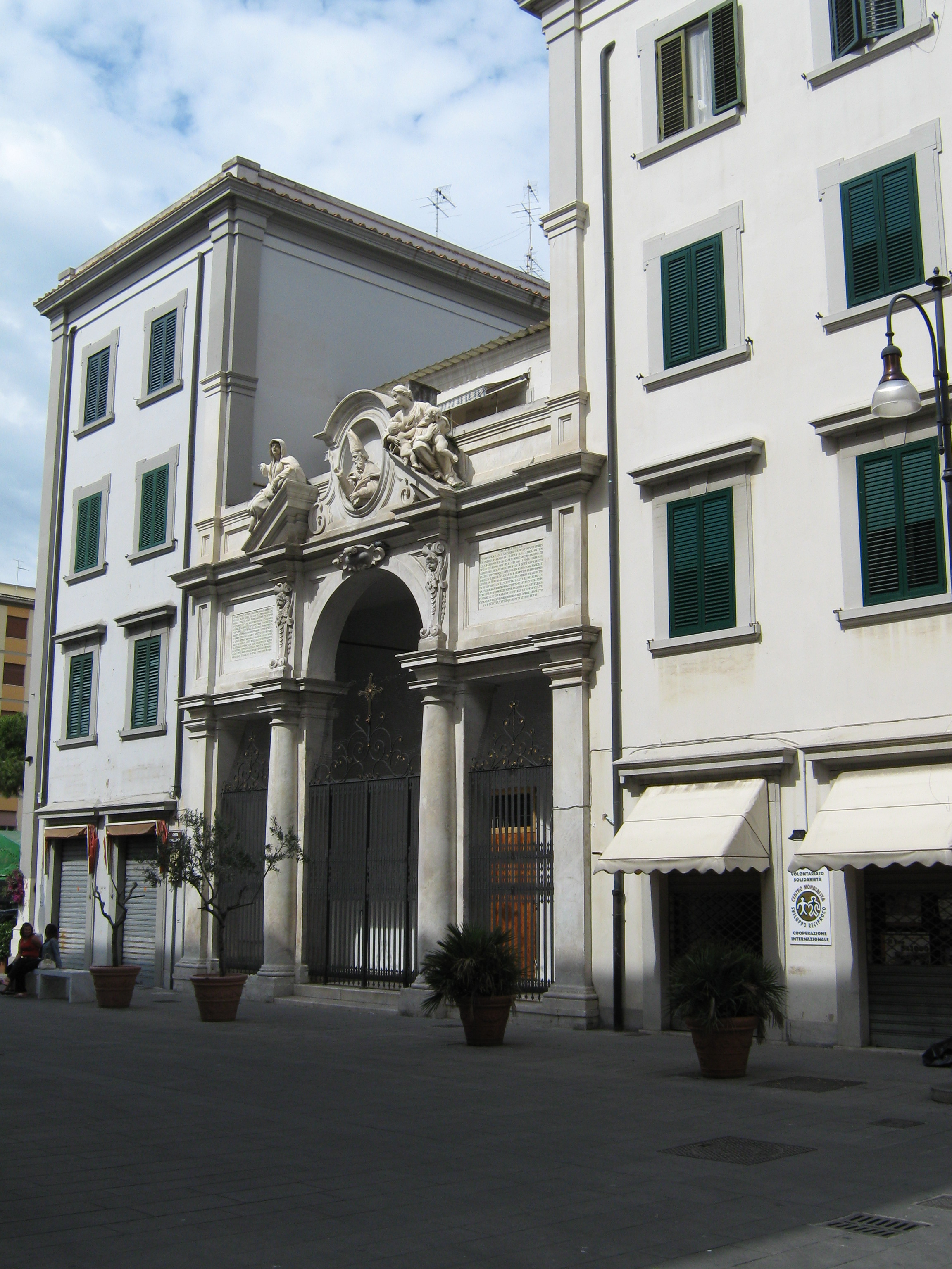 Livorno: la chiesa armena di San Gregorio Illuminatore.